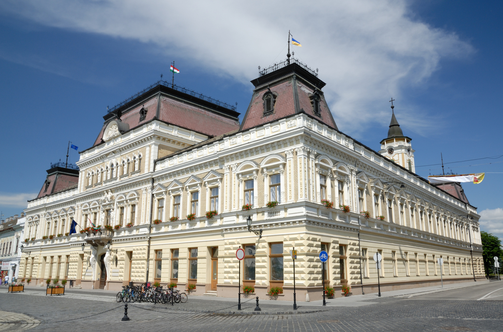 Városháza (Grassalkovich-ház) (Baja, Szentháromság tér 1., Deák Ferenc utca 2., Szentháromság tér 1. - Deák Ferenc utca 2.) This is a photo of a monument in Hungary. Identifier: 2123